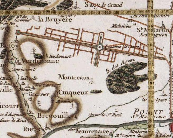 Cinqueux (60) par la carte de Cassini.